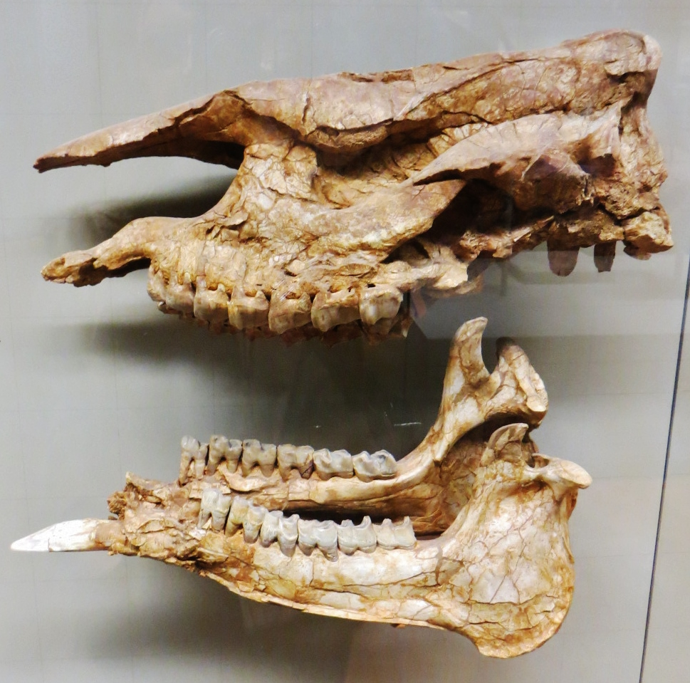 Fossil of Plesiaceratherium- Took the picture at Museum am Lowentor, Stuttgart